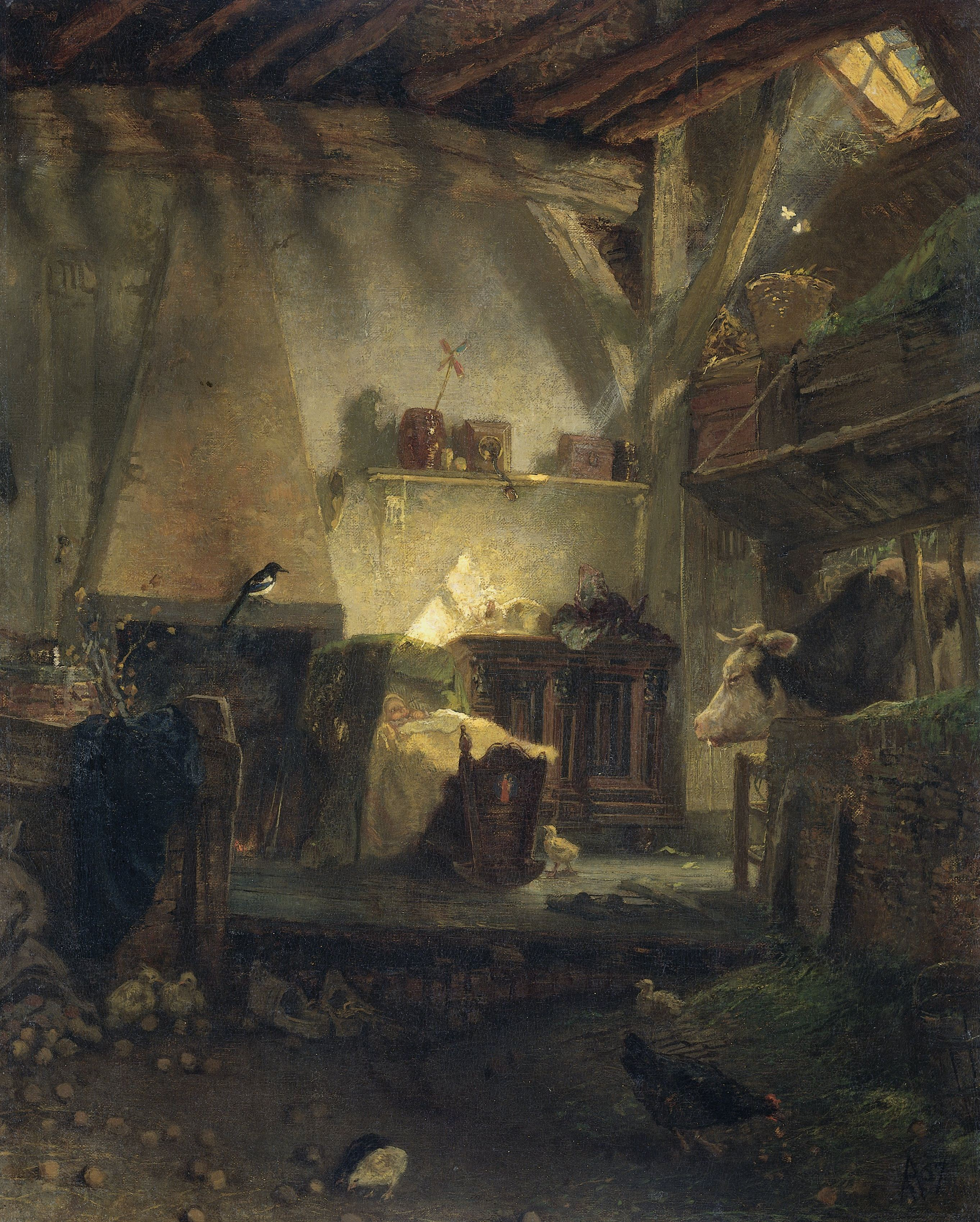 Voorstelling getiteld 'Het welbewaakte kind'. Interieur van een boerenwoning met een wieg waarin een kind ligt. Het zonlicht schijnt door een dakraam op de wieg. Rechts een koe, op de voorgrond scharrelen enkele kippen.